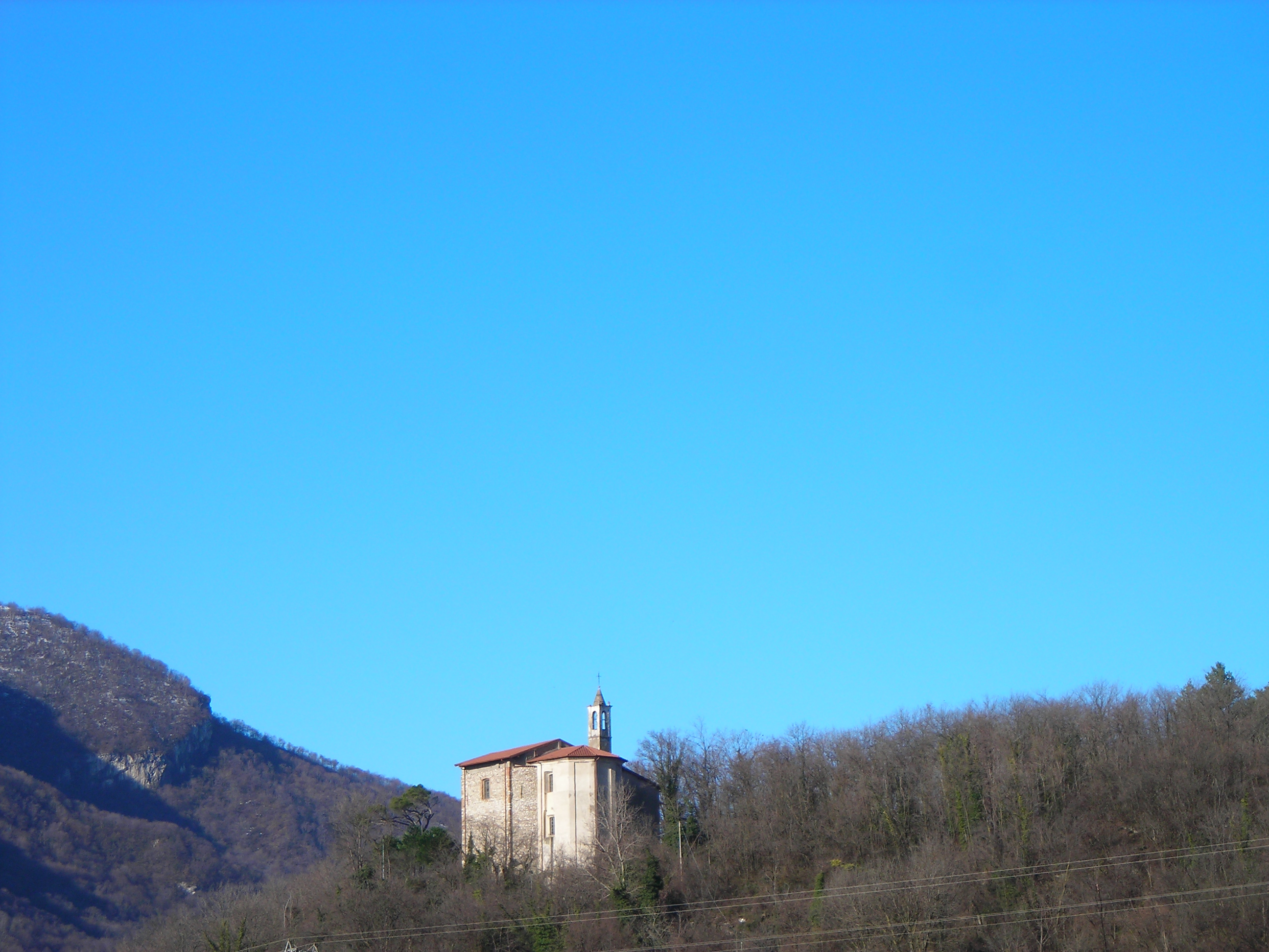 Santuario di Brenno Useria (Arcisate)